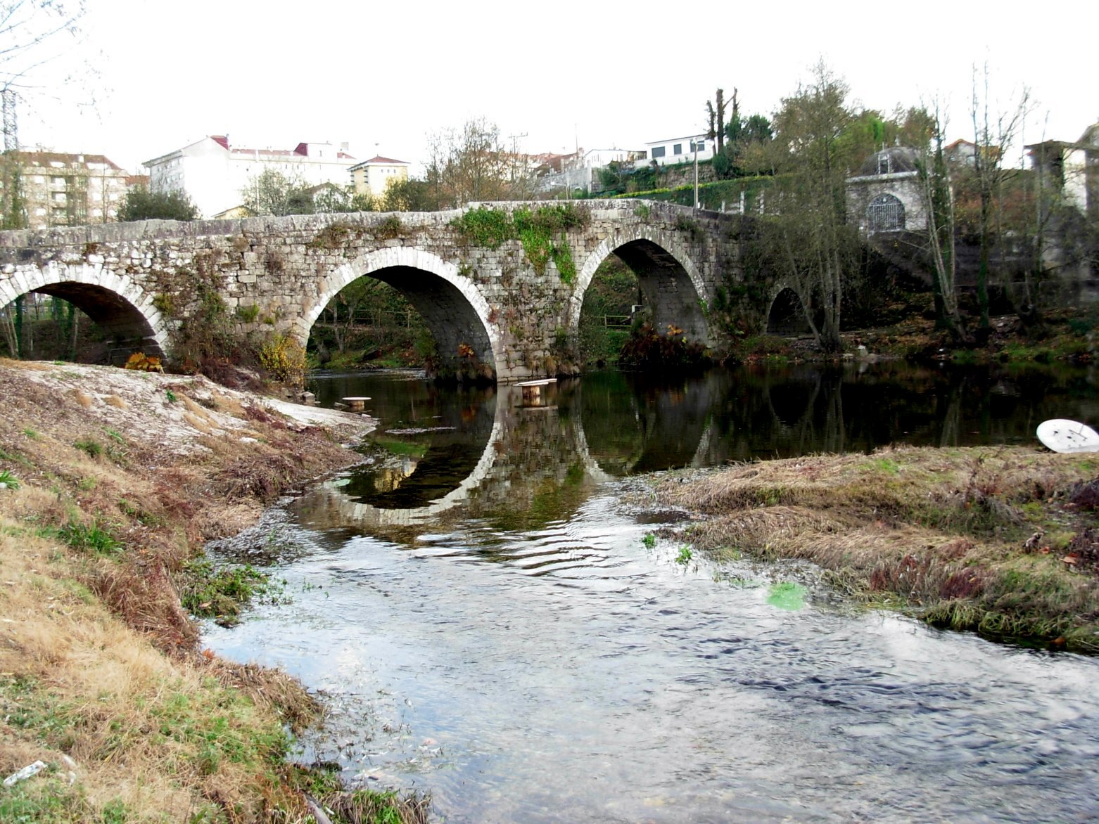 Puente sobre el rio Tea